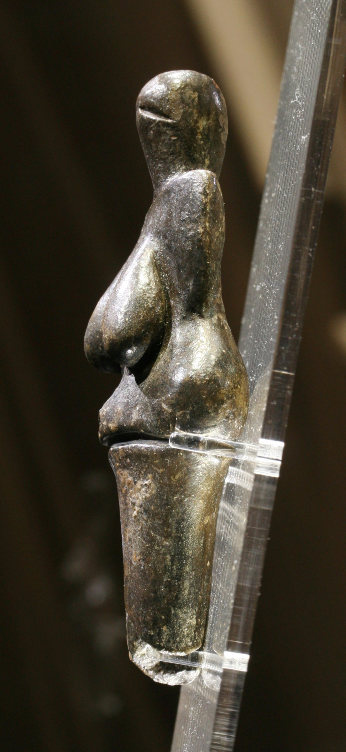 Věstonická venuše na výstavě Lovci mamutů v Národním muzeu v Praze (zleva)